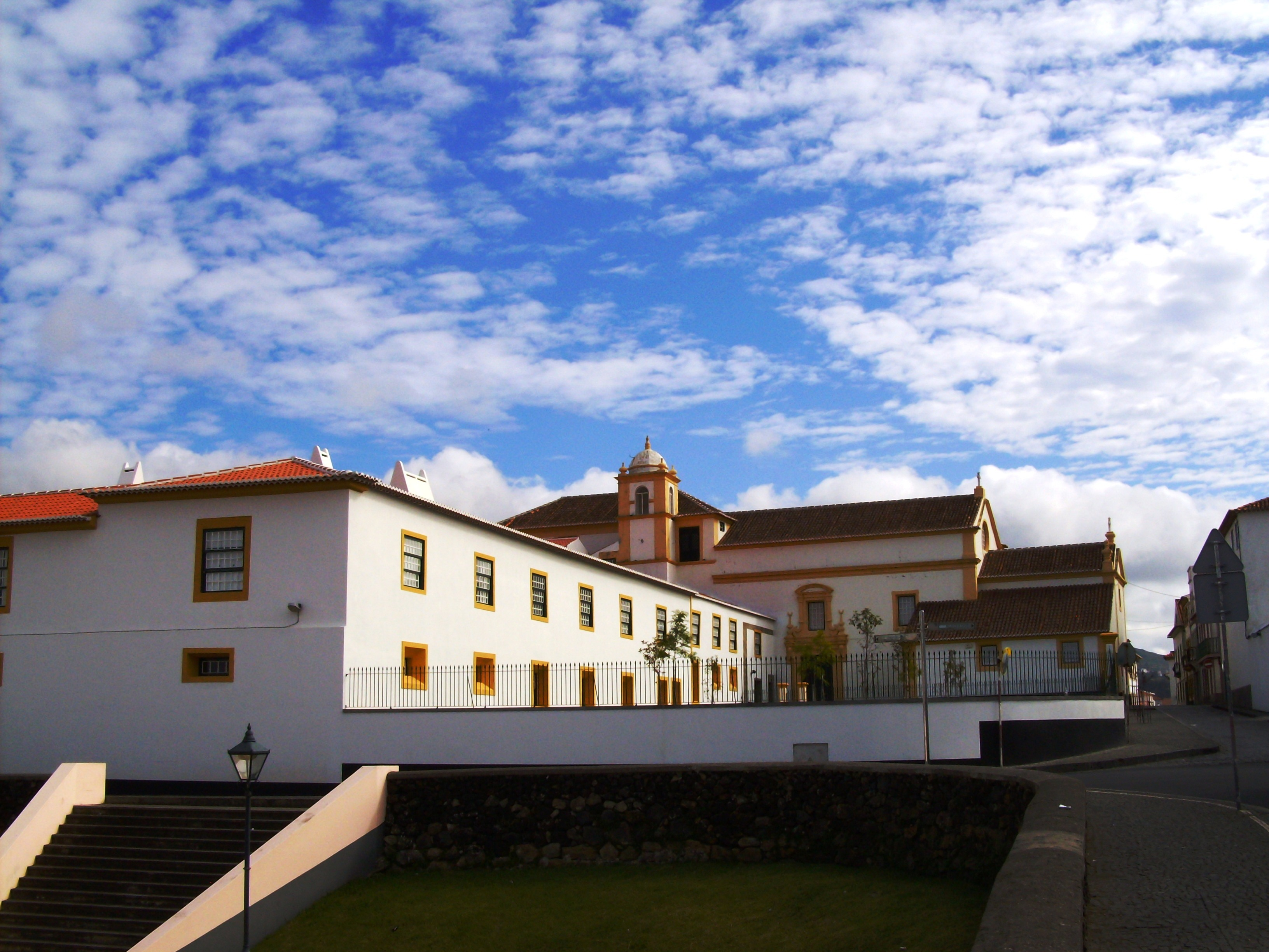 Convento de São Gonçalo, freguesia da Sé, cidade e concelho de Angra do Heroísmo, ilha Terceira, Açores.